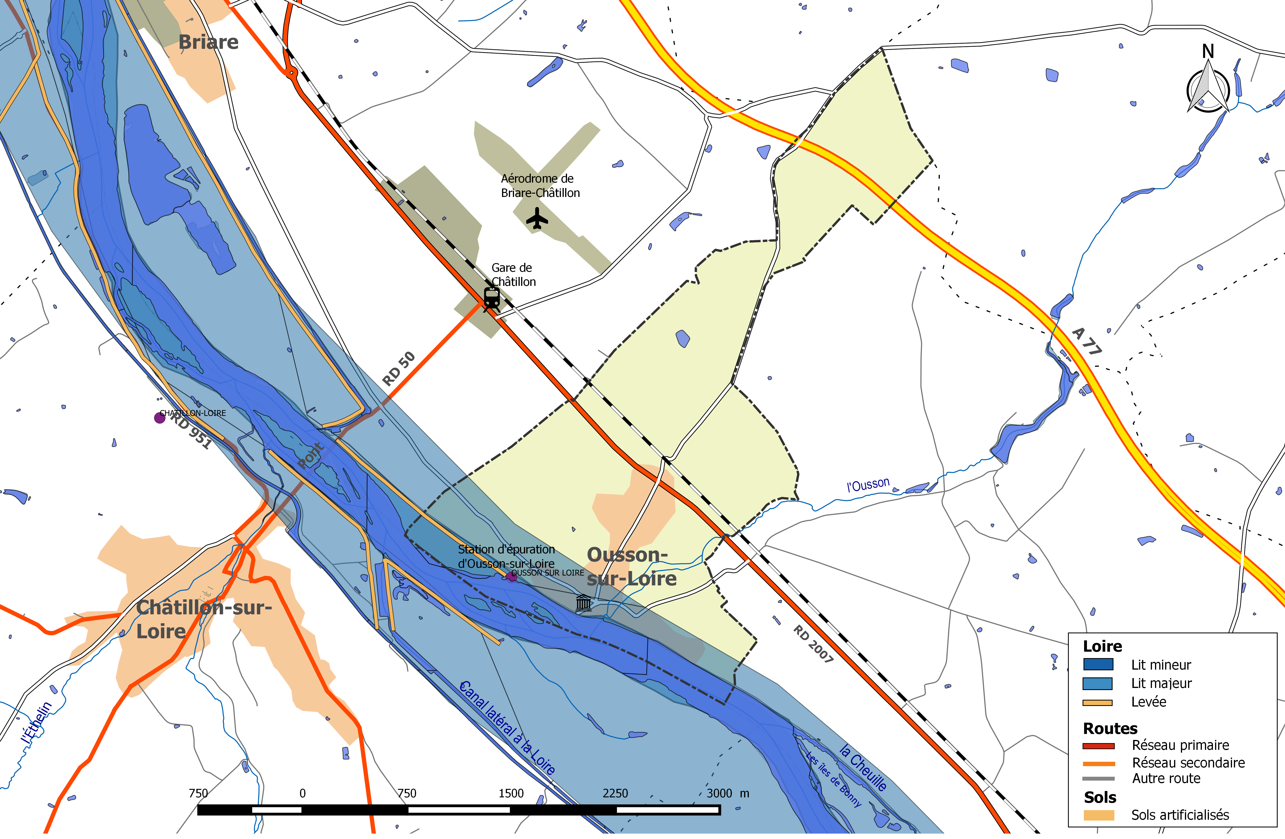 Zone inondable et réseaux hydrographique et routier de la commune d'Ousson-sur-Loire